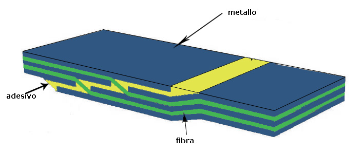 esempio di un giunto FML (fiber metal laminate) splice, example of a FML joint.